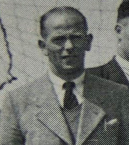 Uitsnede van Barend de Boer, Nederlands voetbaltrainer van J.V.C. tussen 1944 en 1964.